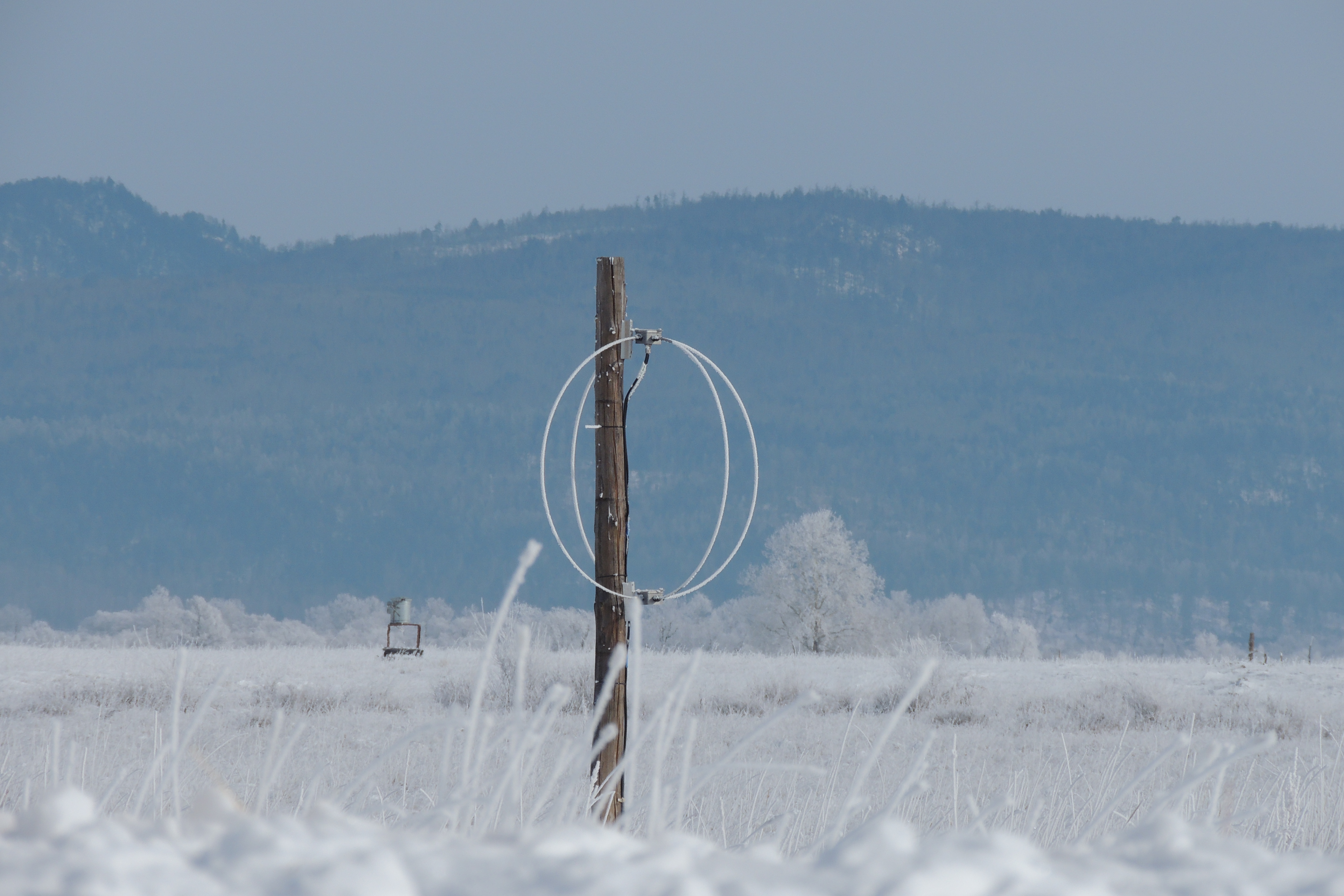 Антенна установки Tunka-Rex